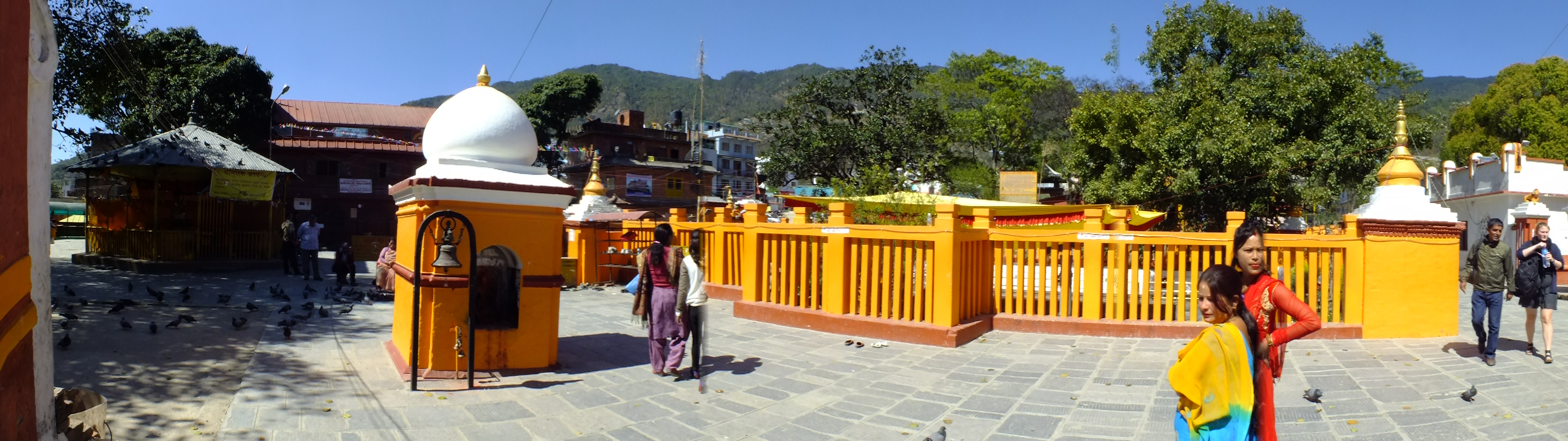 2015-3 Budhanilkantha,Nepal ブダニールカンタ寺院